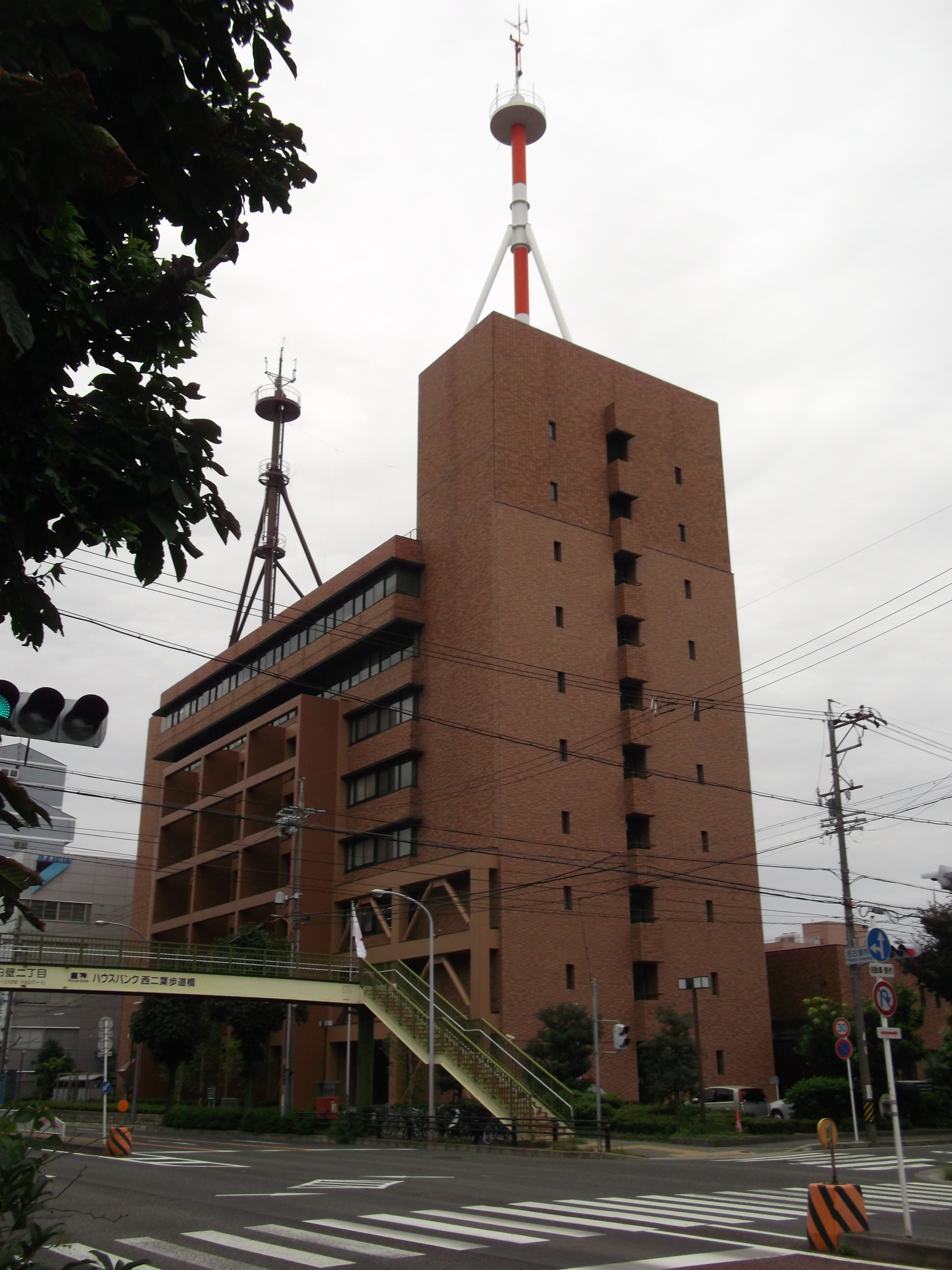 名古屋市東区白壁の名古屋合同庁舎3号館を北側公道西側より撮影（東海総合通信局、東海矯正管区、矯正研修所名古屋支所、東海北陸厚生局、名古屋北労働基準監督署）